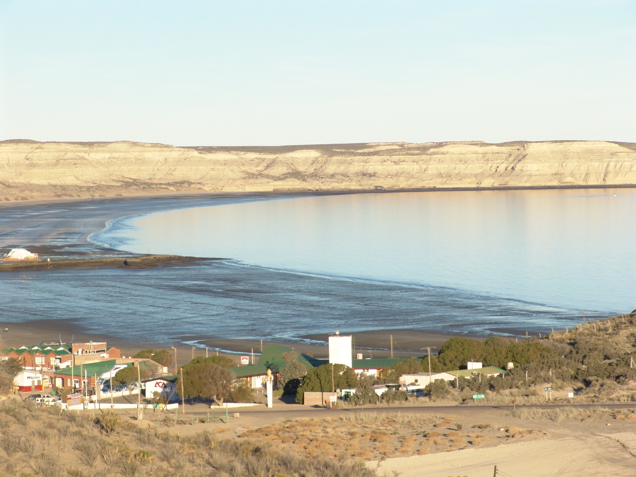 Vista panorámica de Puerto Piramides